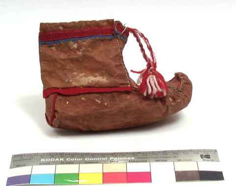 Komag fra Kautokeino, ca. 1955. Fra filmskaperen Per Høst (1907-1971) som oppholdt seg i Kautokeino da han laget filmen "Same Jakki" (1957). Mange gjenstander kom inn til museet etter dette oppholdet (3585-3587 og 3604-3615), andre kom fra hans dødsbo 1973 (3770-3800).